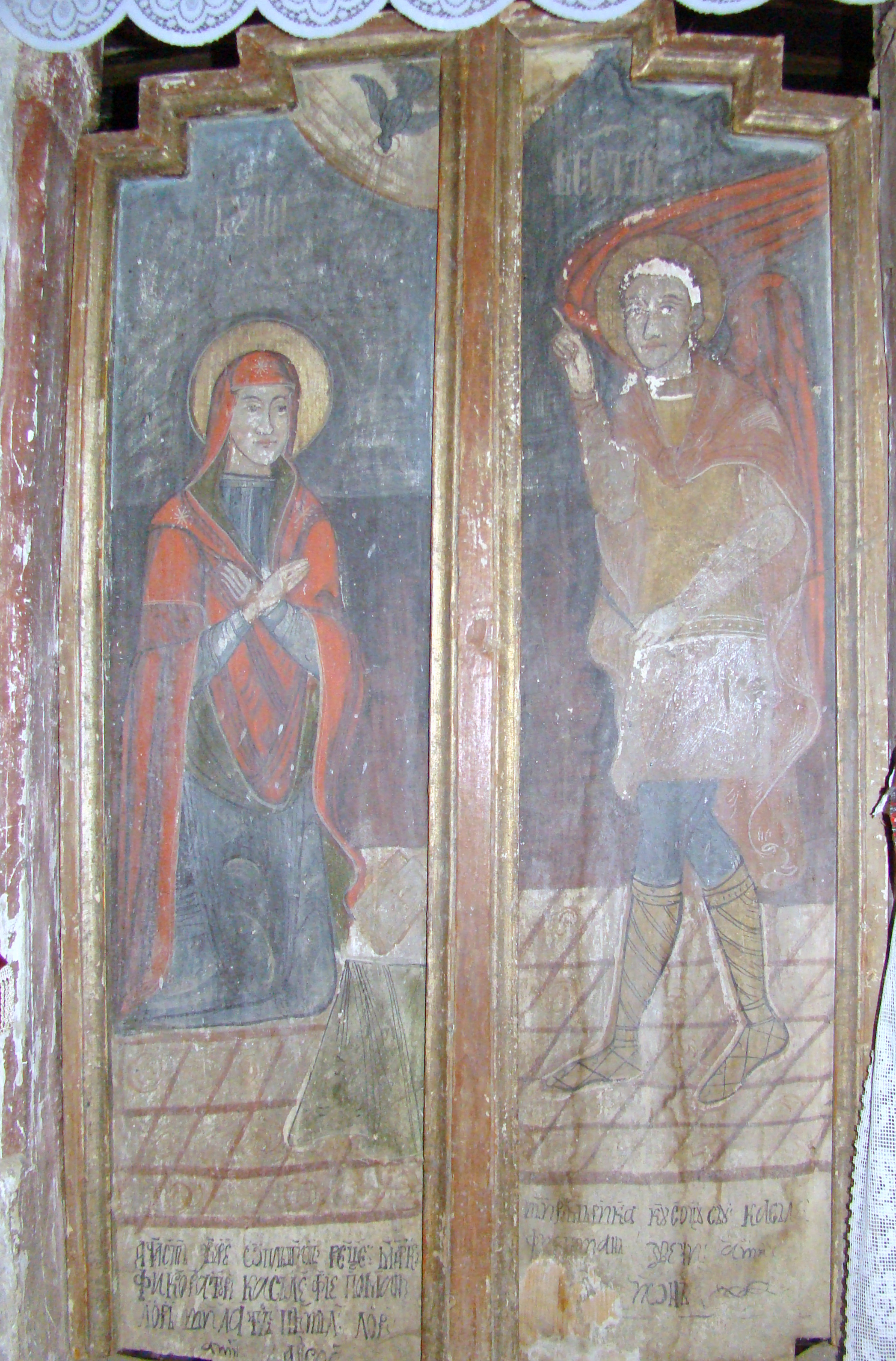 Biserica de lemn „Sfinții Arhangheli” din Berindu, județul Cluj